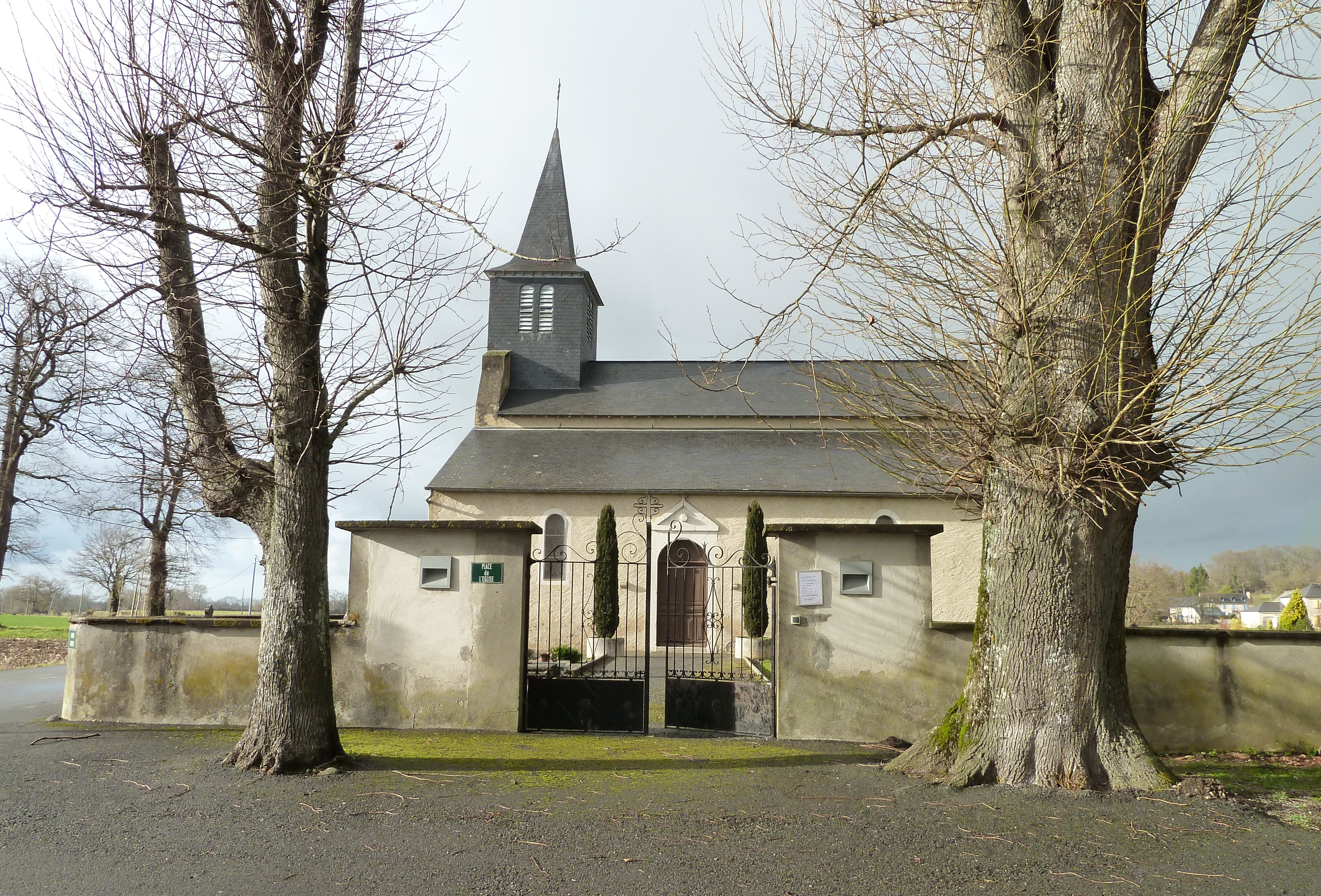 Église d'Arrien (Pyrénées-Atlantiques)